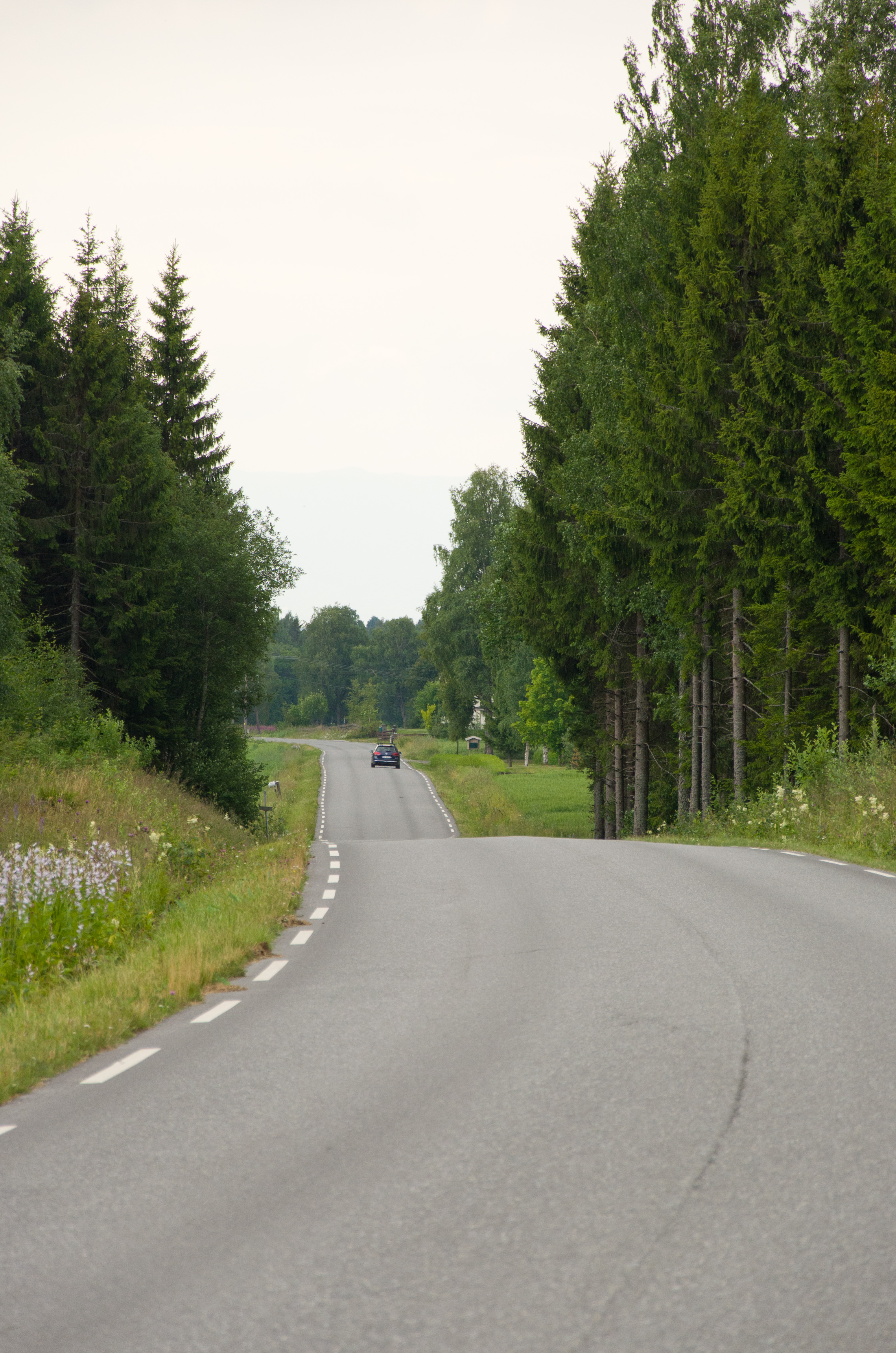 Fylkesvei 1796 (tidl. 103), Gåsbuvegen